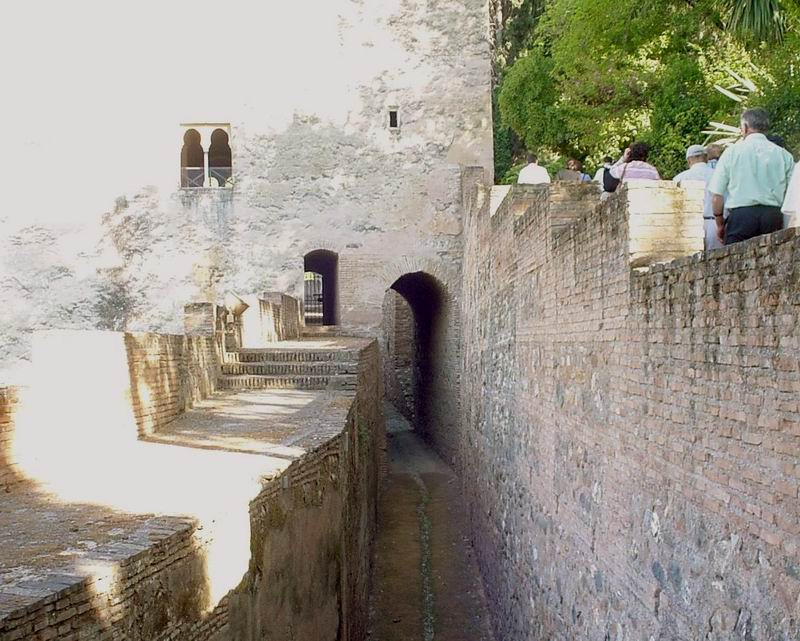 Granada Alhambra eigenes Foto 2004 public domain Mewes 07:59, 5. Mär 2005 (CET) Ronde